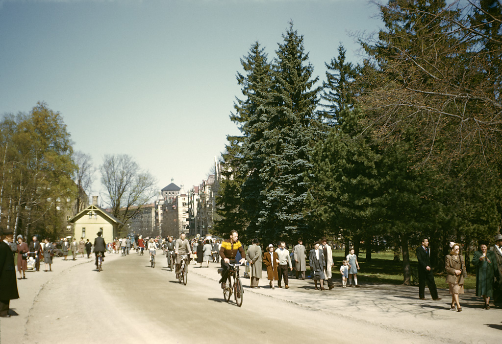 People at Slottsskogen ("Castle Forest") in Gothenburg. Människor vid Slottsskogen i Göteborg. Parish (socken): Göteborg Province (landskap): Västergötland Municipality (kommun): Göteborg County (län): Västra Götaland Photograph by: Fredrik Bruno Date: April 1948 Format: Colour slide Persistent URL: Read more about the photo database (in english)